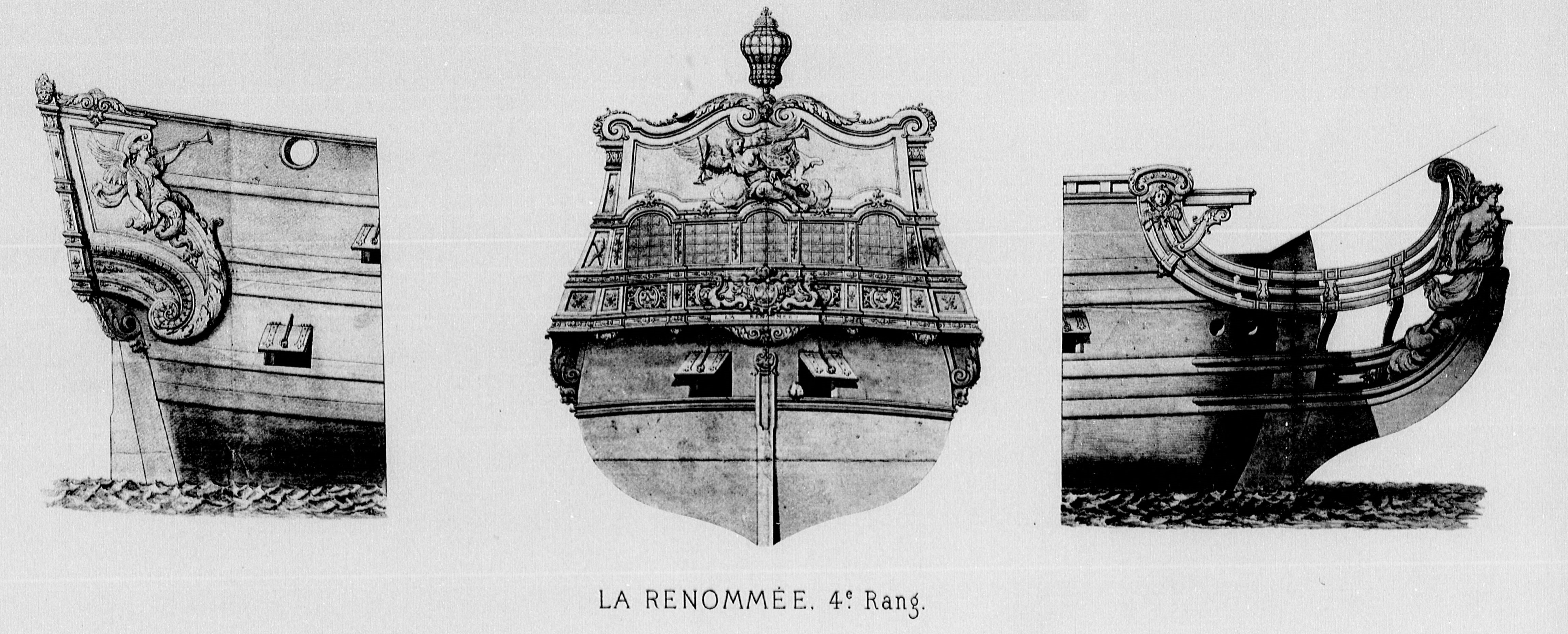 Bouteilles, tableau arrière et figure de proue de la Renommée, vaisseau de 40-48 lancé en 1698. Vaisseau de 4ème rang.